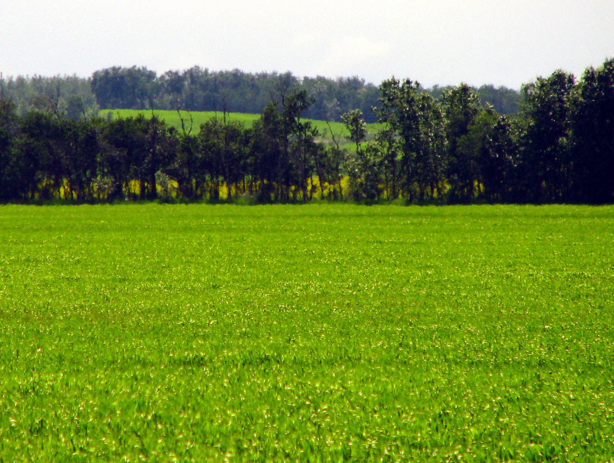 Prairie Summer